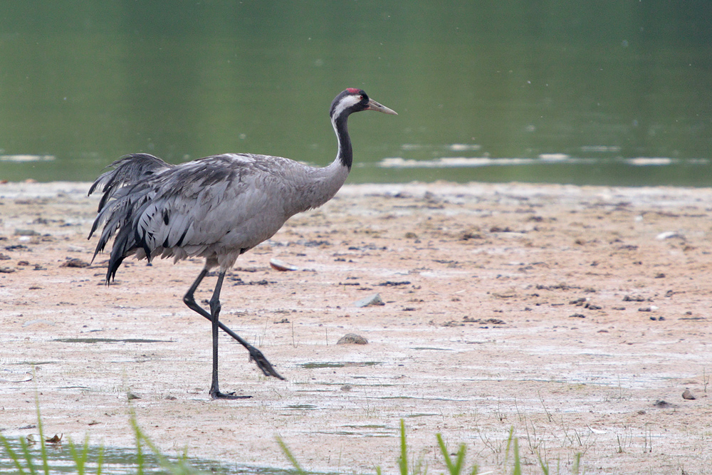 Kraniche im Ilkerbruch